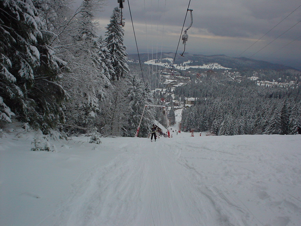 Горнолыжный спуск в Пояна-Брашов (Румыния)